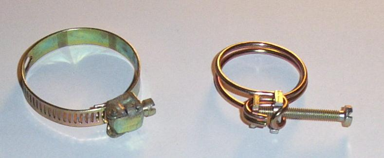 Schlauchschellen